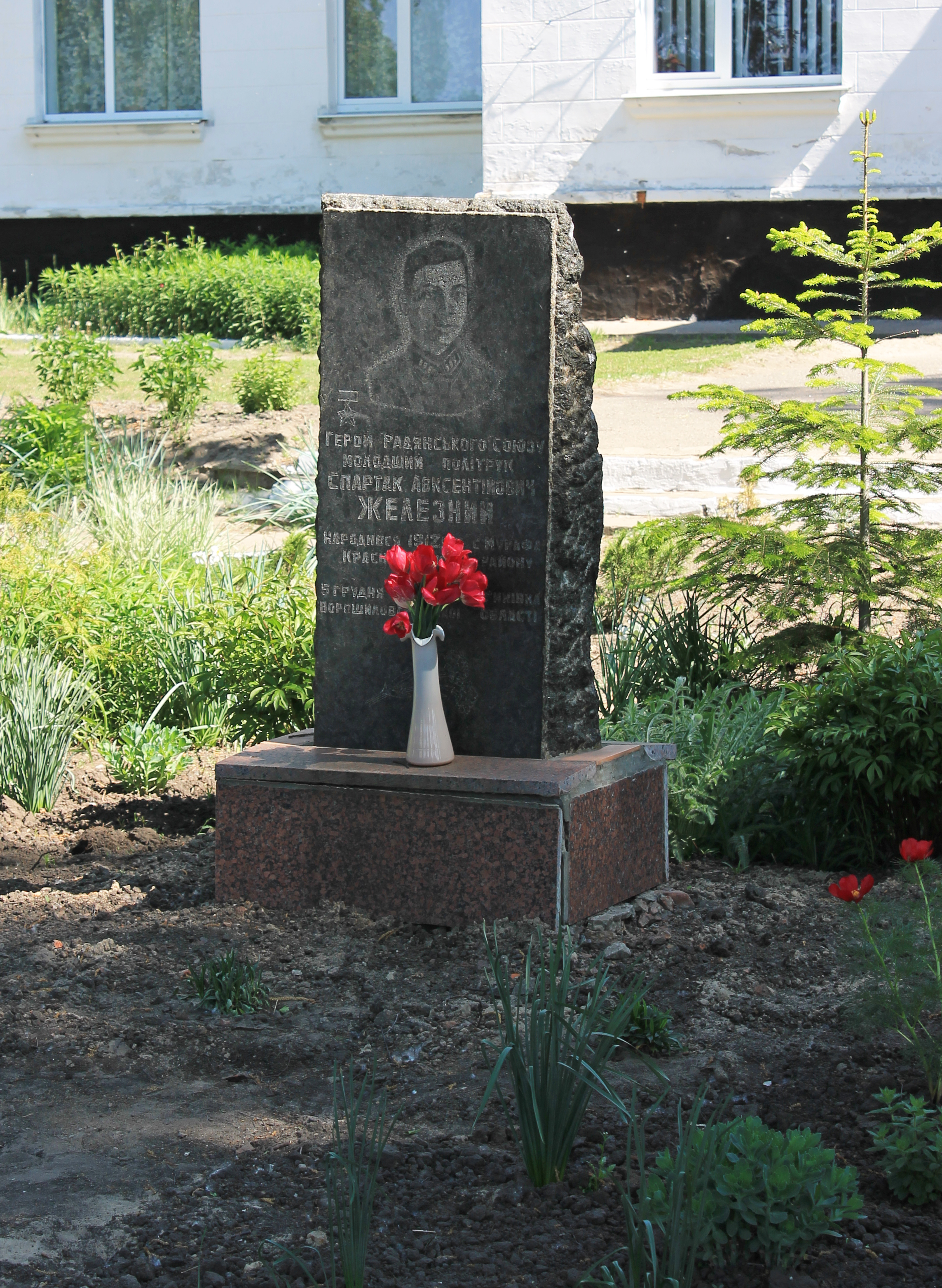 Пам'ятний знак С. А. Железному – Герою Радянського Союзу, с.Мурафа, Краснокутський р-н., Харківська обл.